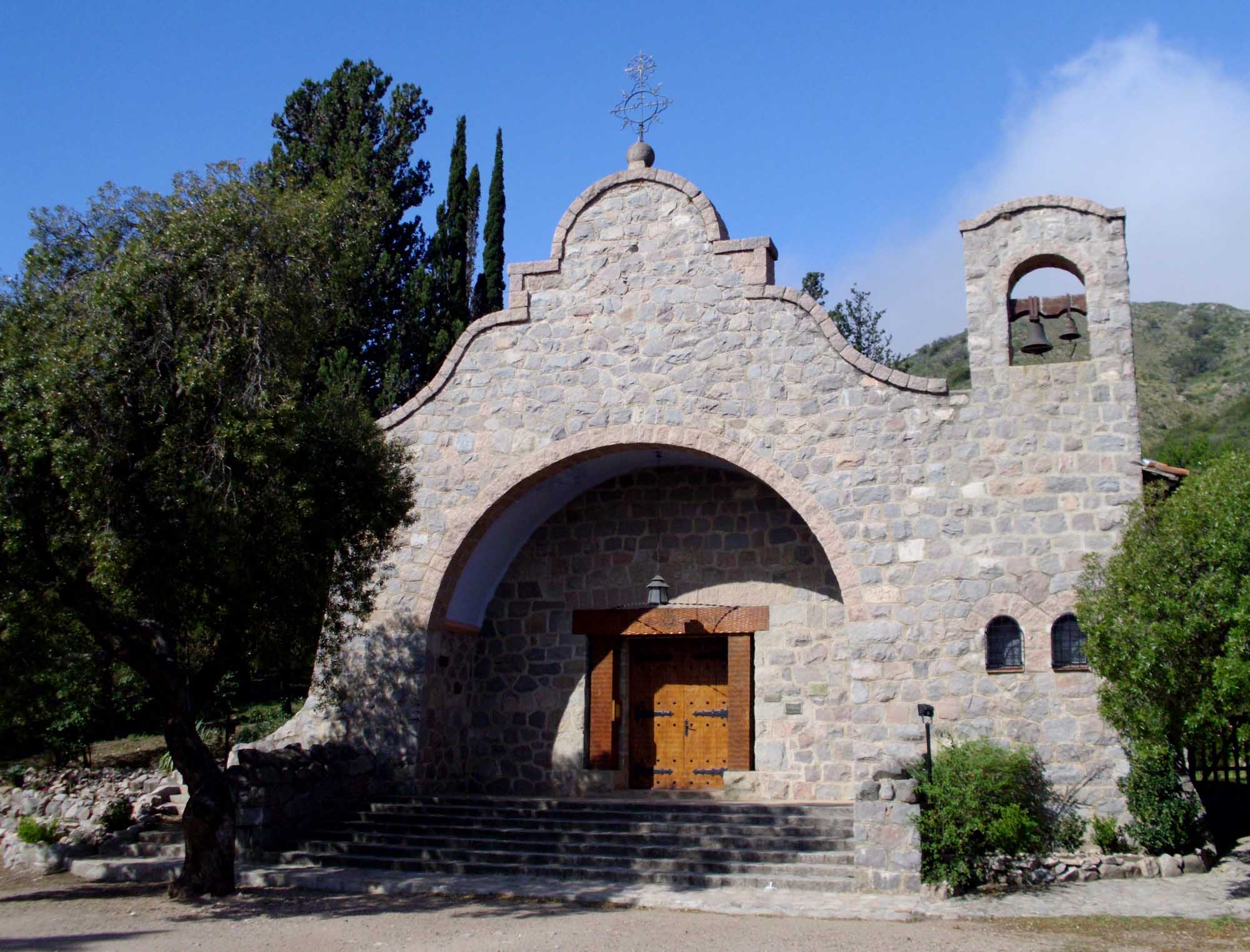 Capilla Santa Teresita, Los Cocos (Córdoba, Argentina).